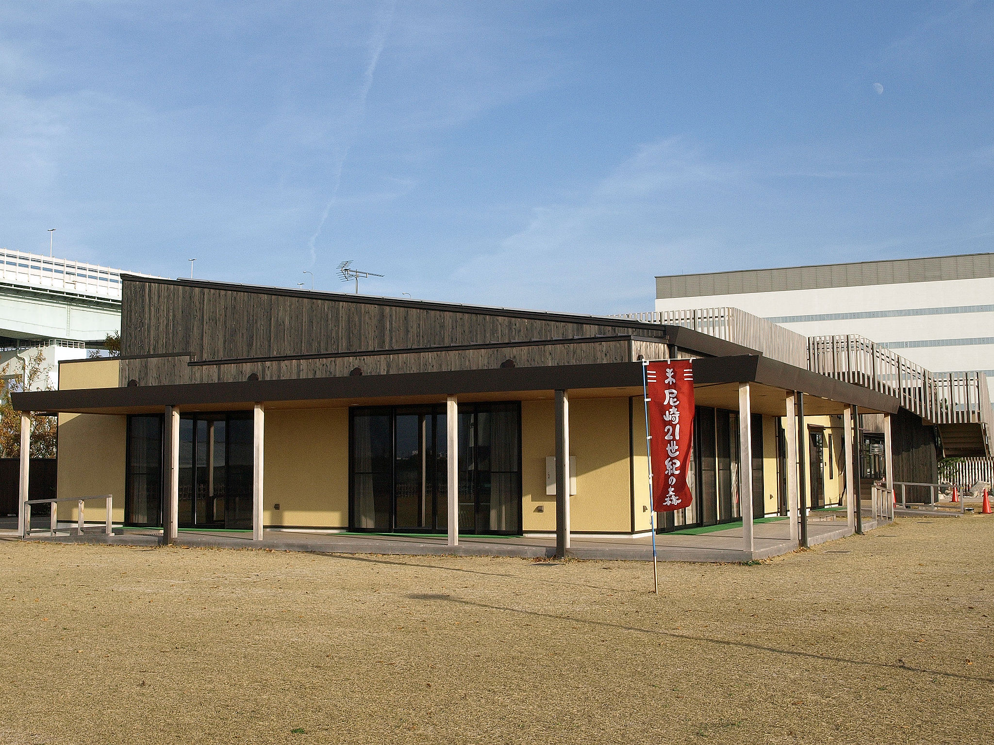 尼崎の森中央緑地 パークセンター外観